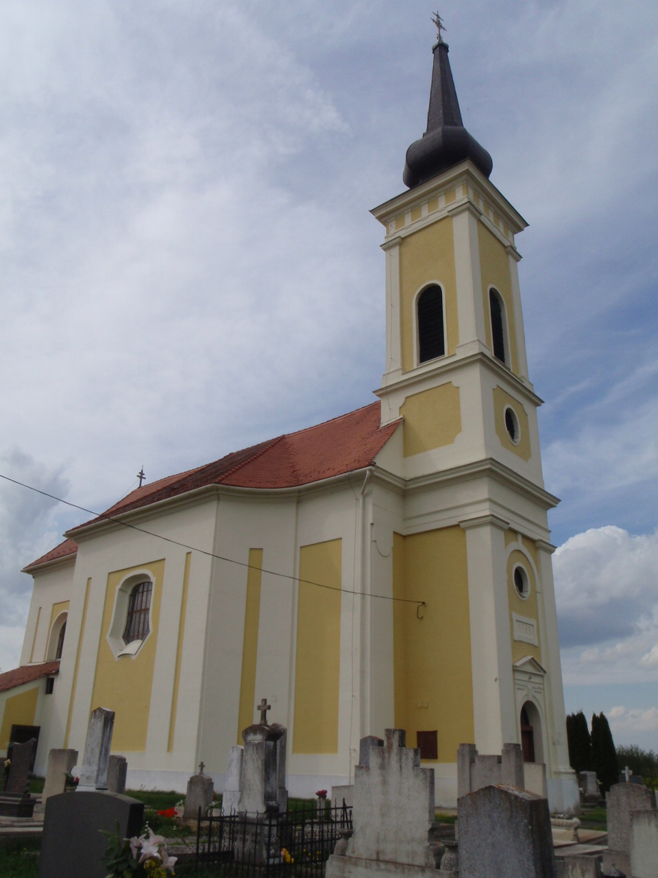 Harasztifalu Szt László király templom, épült 1785